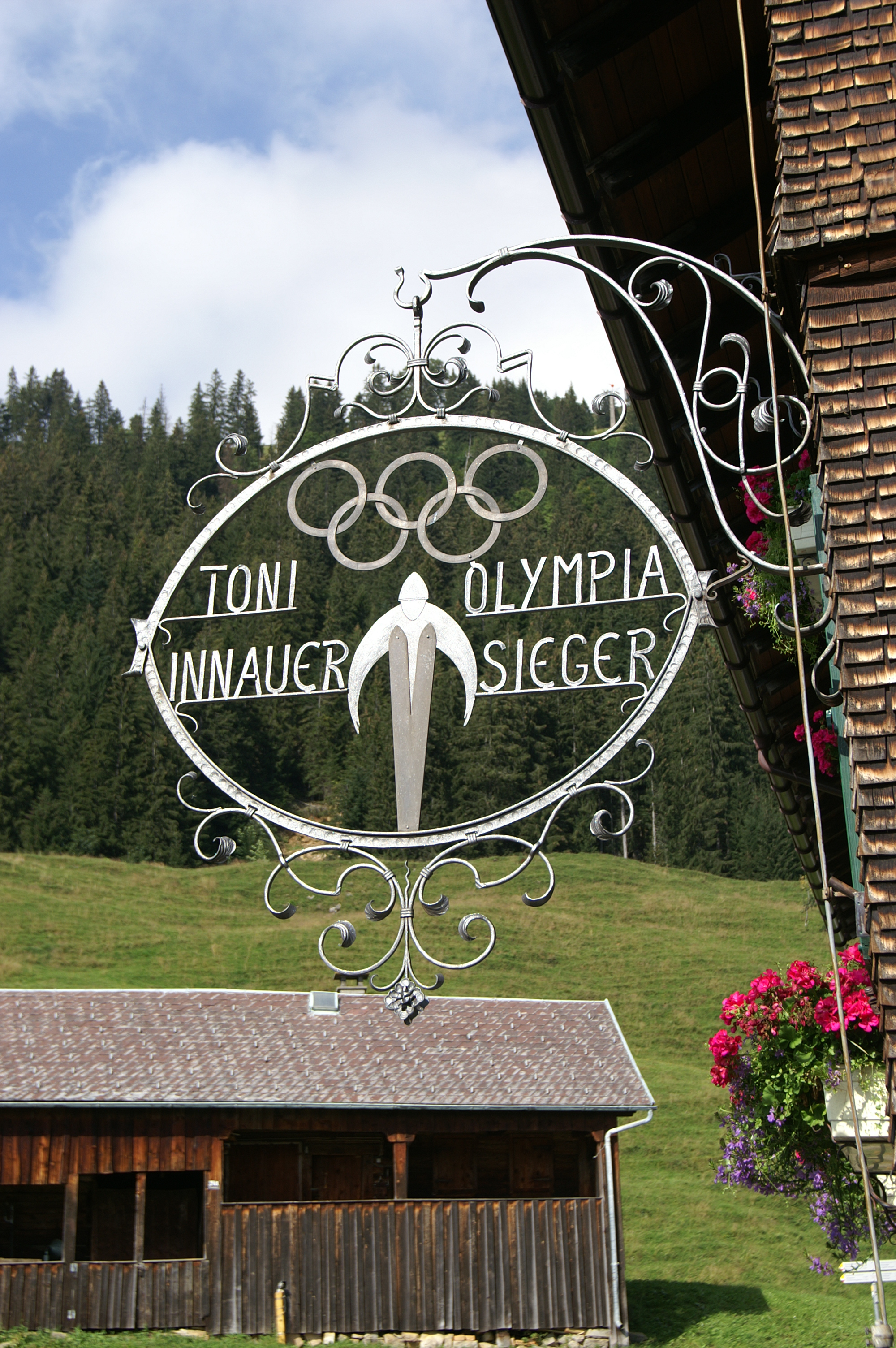 Erinnerung auf dem Gasthaus Sonderdach in Bezau an den Olympiasieger Toni Innauer, in Lake Placid 1980